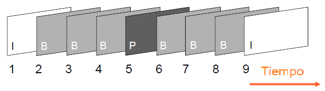 Secuencia de imagenes I, P y B.